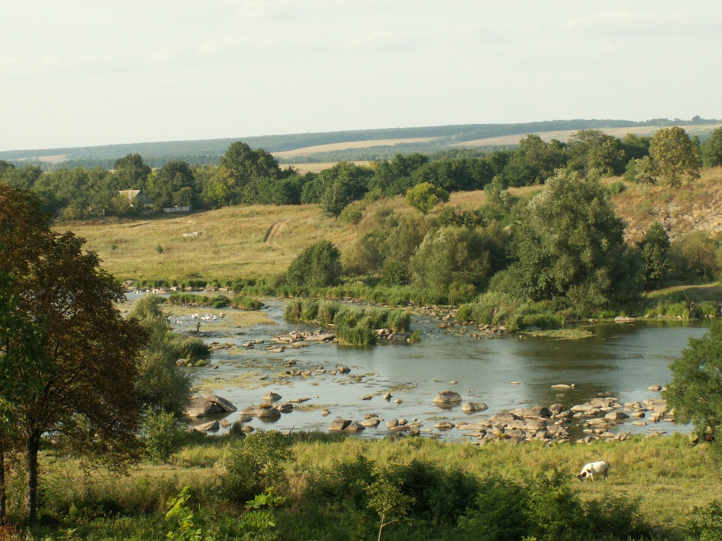 Краєвид на канавські пороги